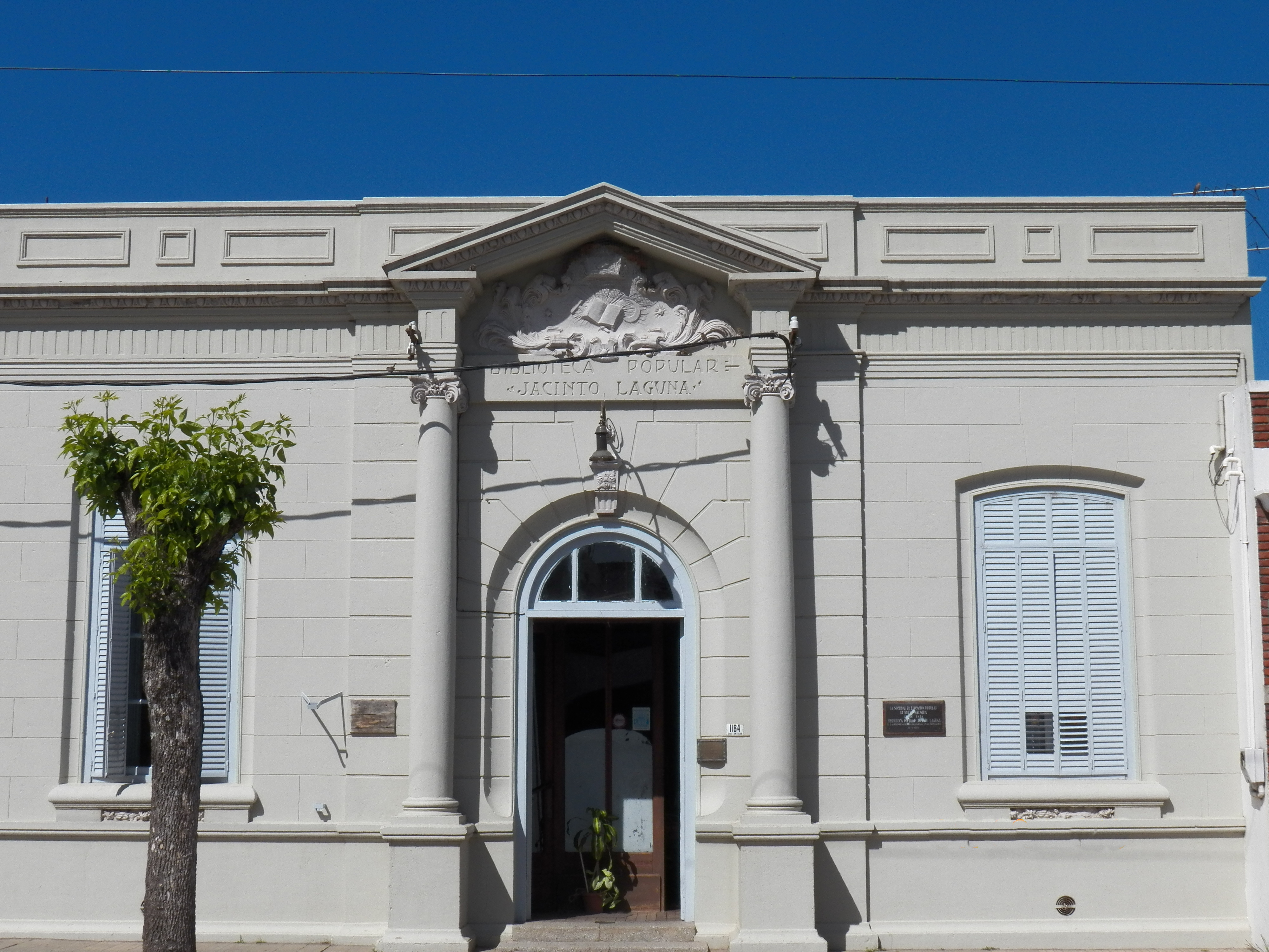 Fachada de la Biblioteca Popular Jacinto Laguna (Nueva Palmira, Uruguay)